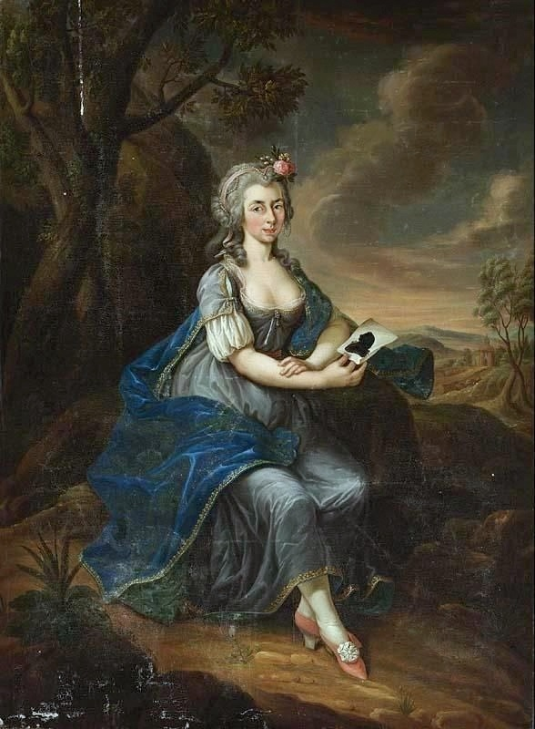 Zofia Fryderyka z rodu Thurn und Taxis Radziwiłłowa (1758-1800)